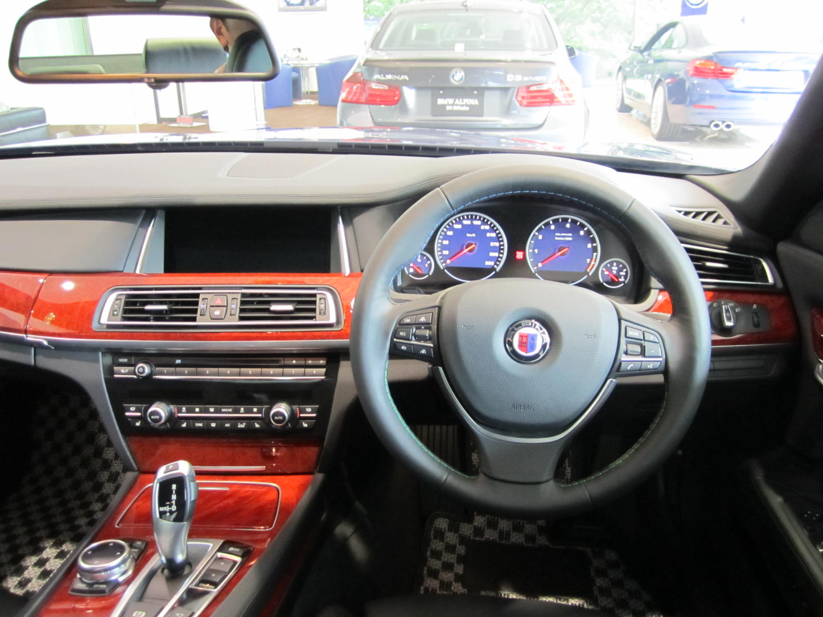 B7Limousine内装